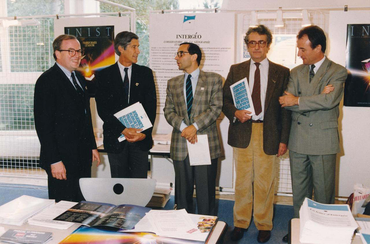 Saint-Dié-des-Vosges, 2e Festival international de géographie (FIG), octobre 1991. Christian Pierret est avec Joël de Rosnay et Rémy Knafou devant le panneau d’Intergéo et de l’Observatoire de la géographie et des géographes. Yves Berger est à sa gauche, ainsi que le maire-adjoint à la culture. Photo d'archive personnelle scannée.